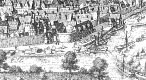 Ansicht von Münden durch Merian, Bildausschnitt